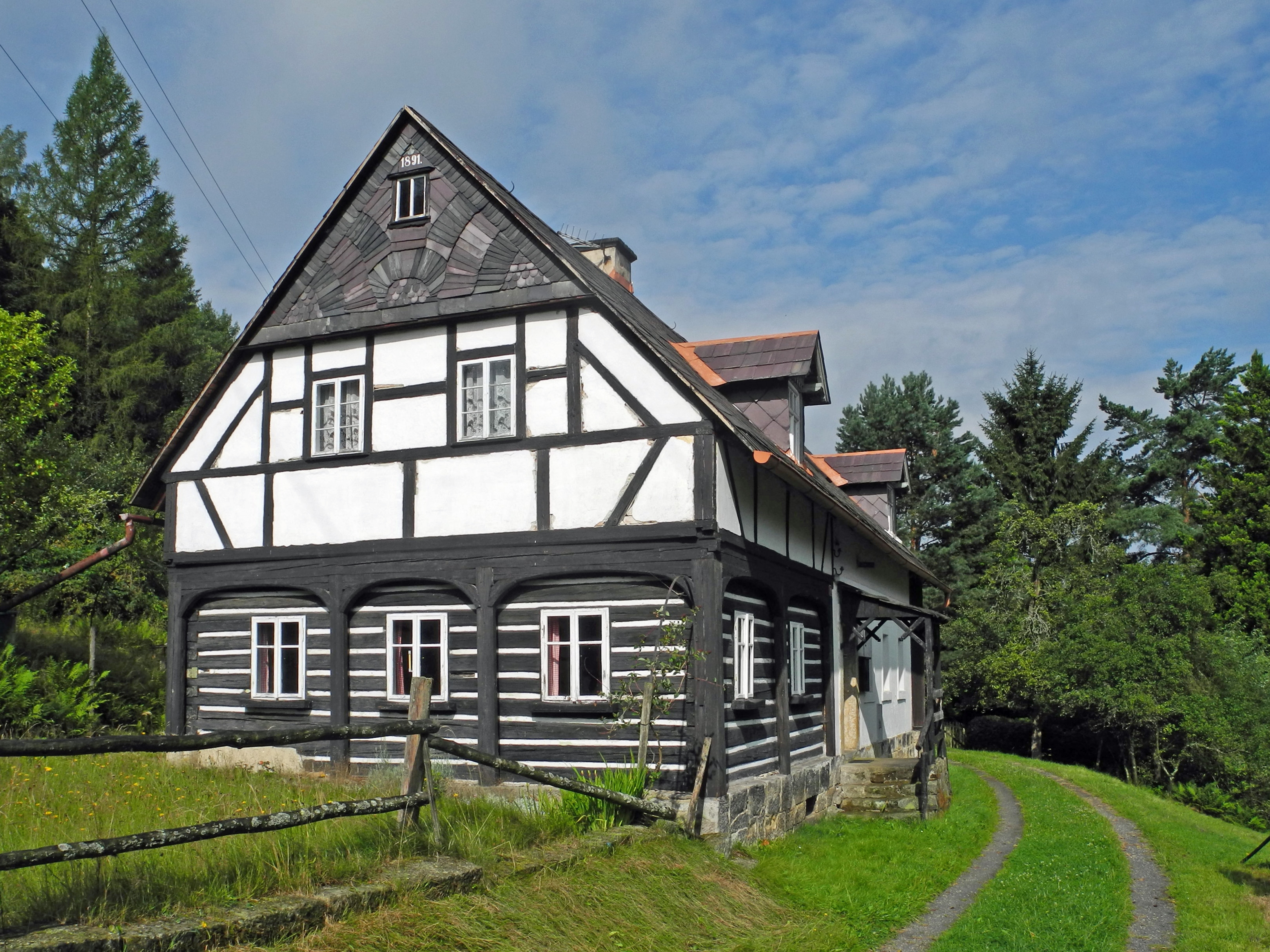 Haus Nr. 11 in Kamenická Stráň (Kamnitzleiten)